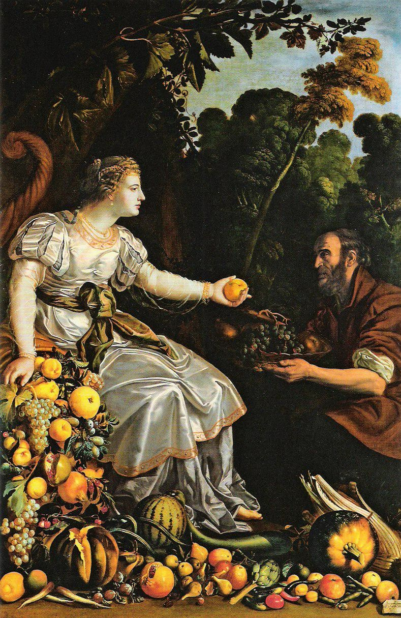 La obra representa a Vertumno y a Pomona, dos personajes de la mitología griega.